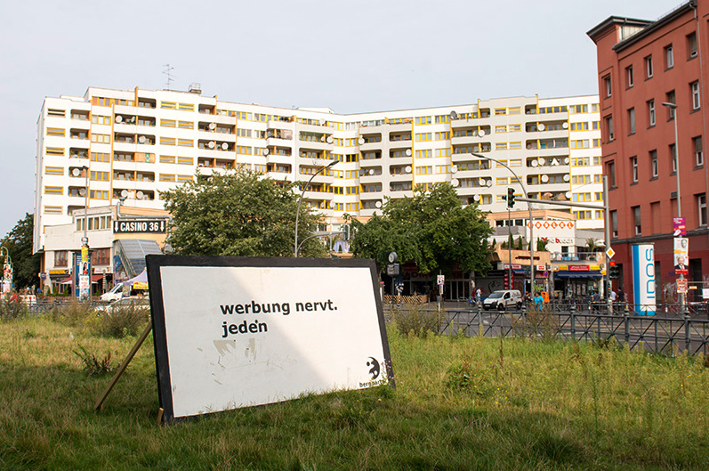 Poster "Werbung nervt" der Bergpartei